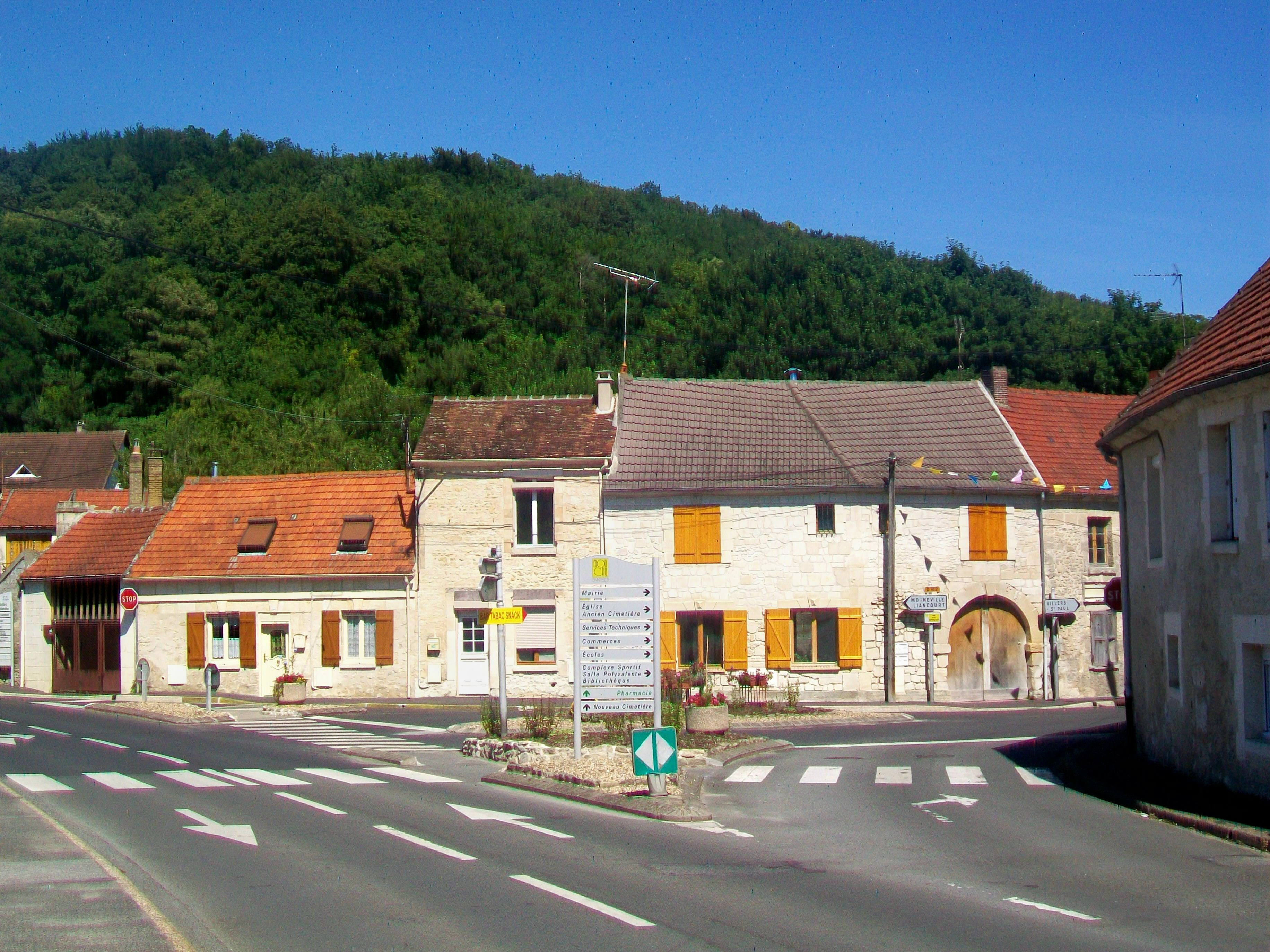 La place publique (nom officiel de la place) à l'entrée ouest du vieux village.